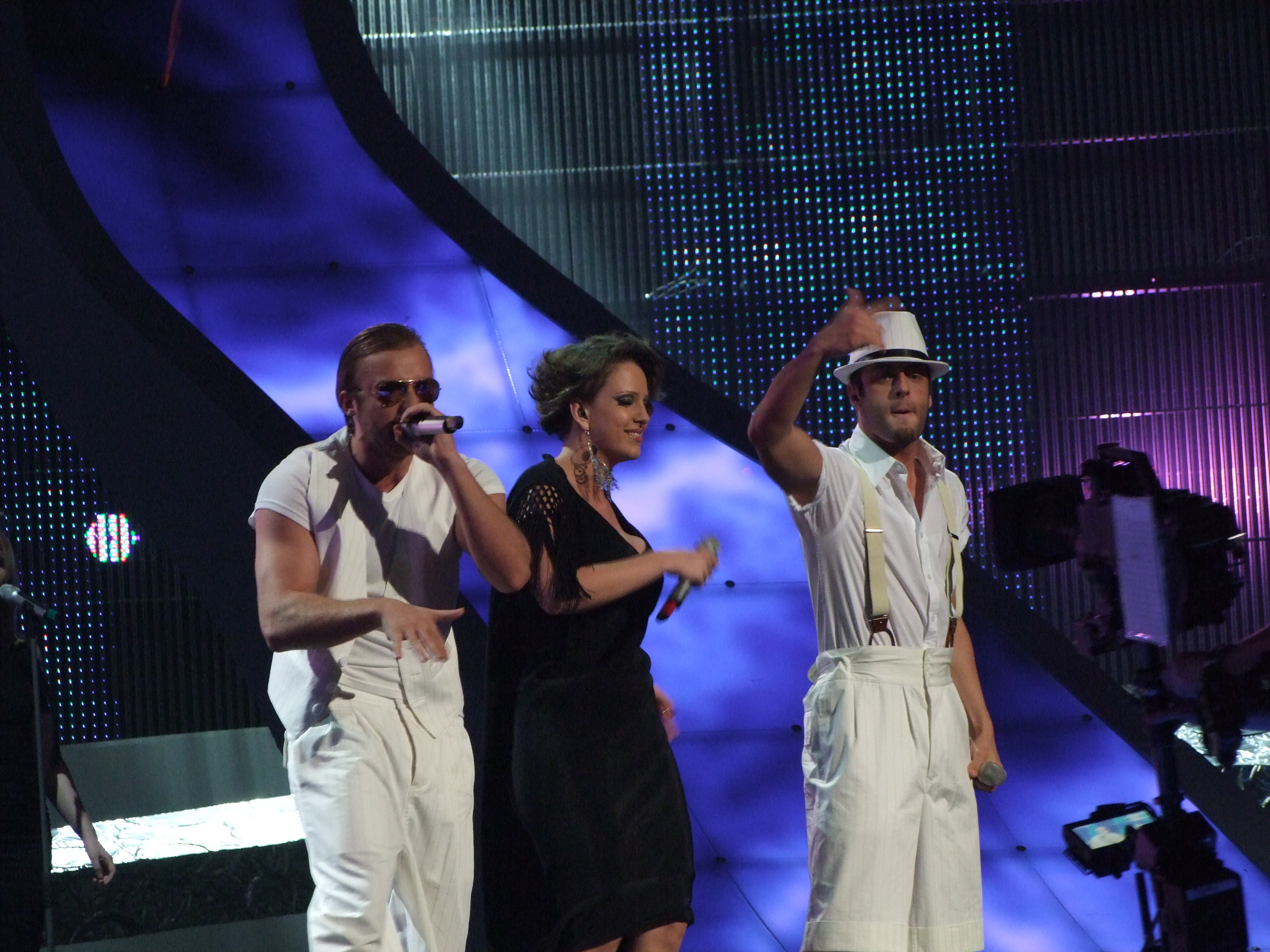 Semifinal 2 Eurovision 2008